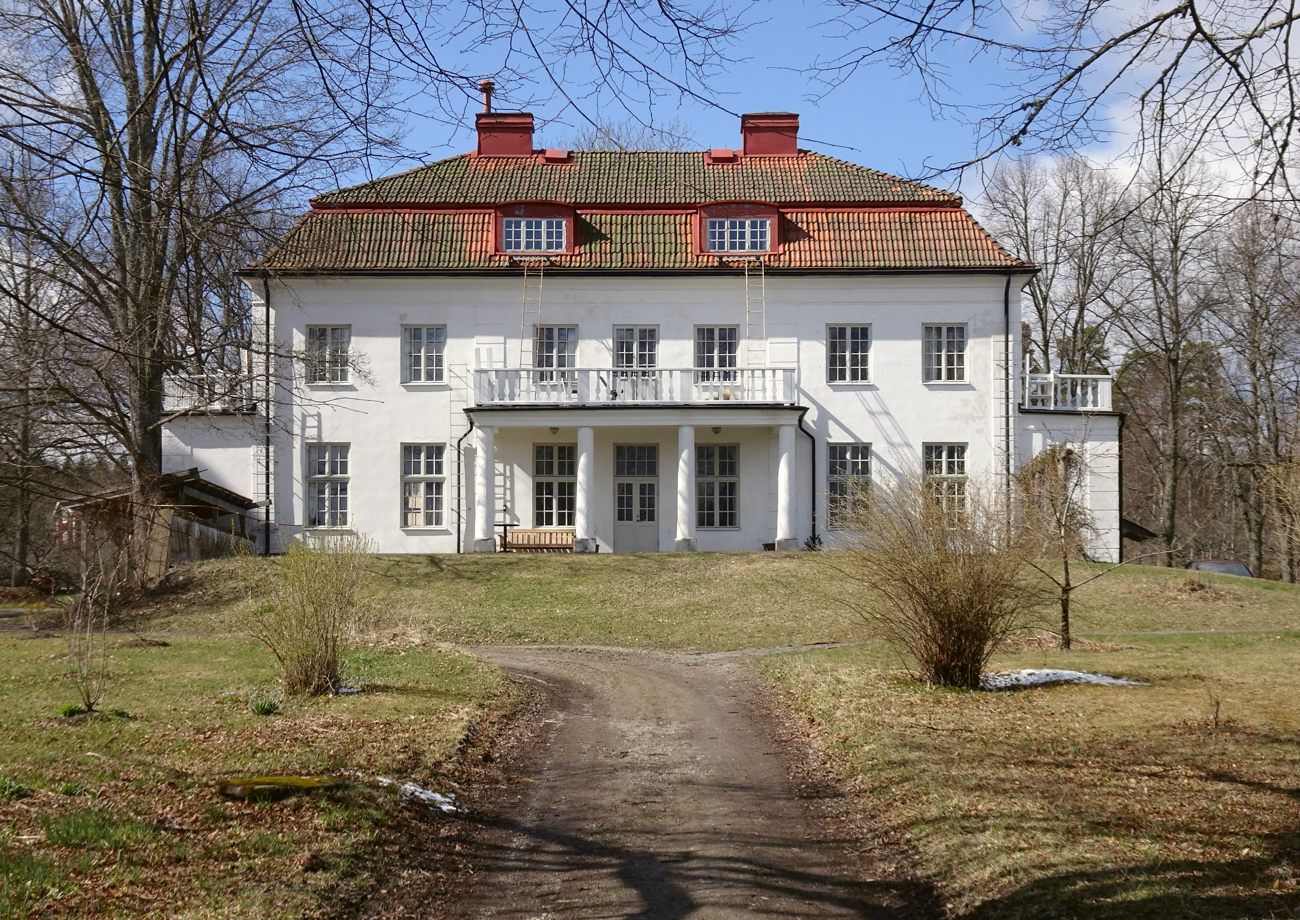 Skillebyholm, huvudbyggnad, fasad mot öster